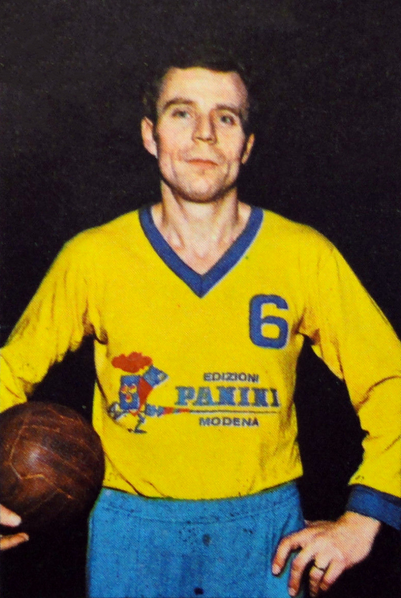 CAMPIONI DELLO SPORT 1969/70-n.329-MUSIL (CEC)-PALLAVOLO